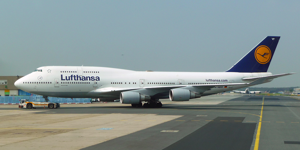 Lufthansa Boeing 747-400 (Reg. D-ABVF), seen at Frankfurt Airport